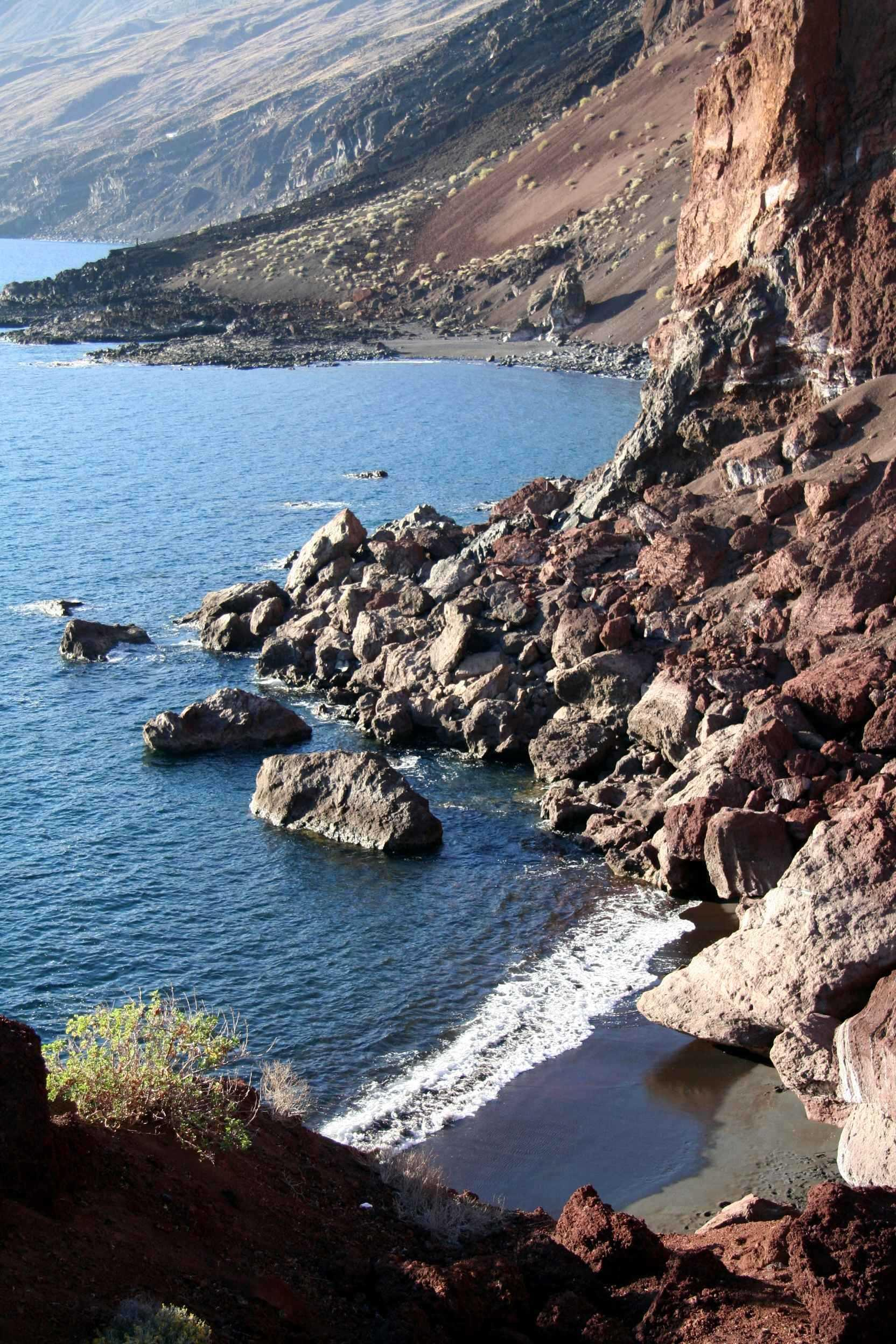 Punta Laja del Lance (Tacoron)